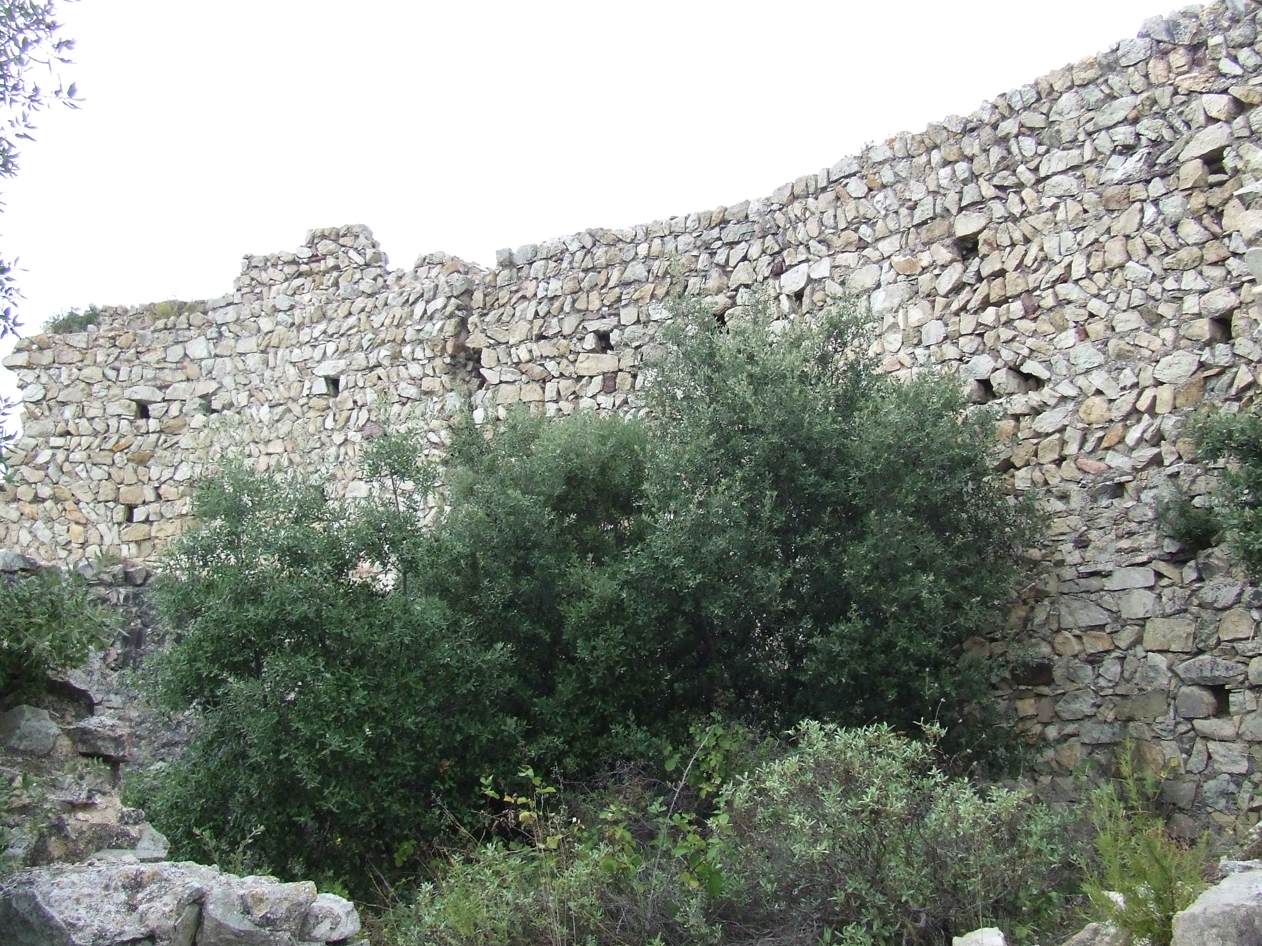 Castell de Montbui (Bigues, Bigues i Riells, Vallès Oriental)